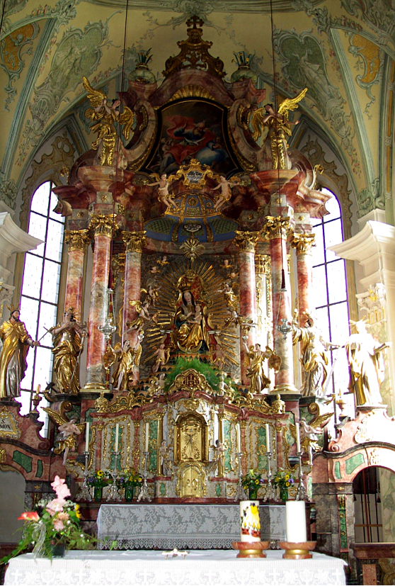 Kath. Pfarrkirche hl. Maria und Friedhof